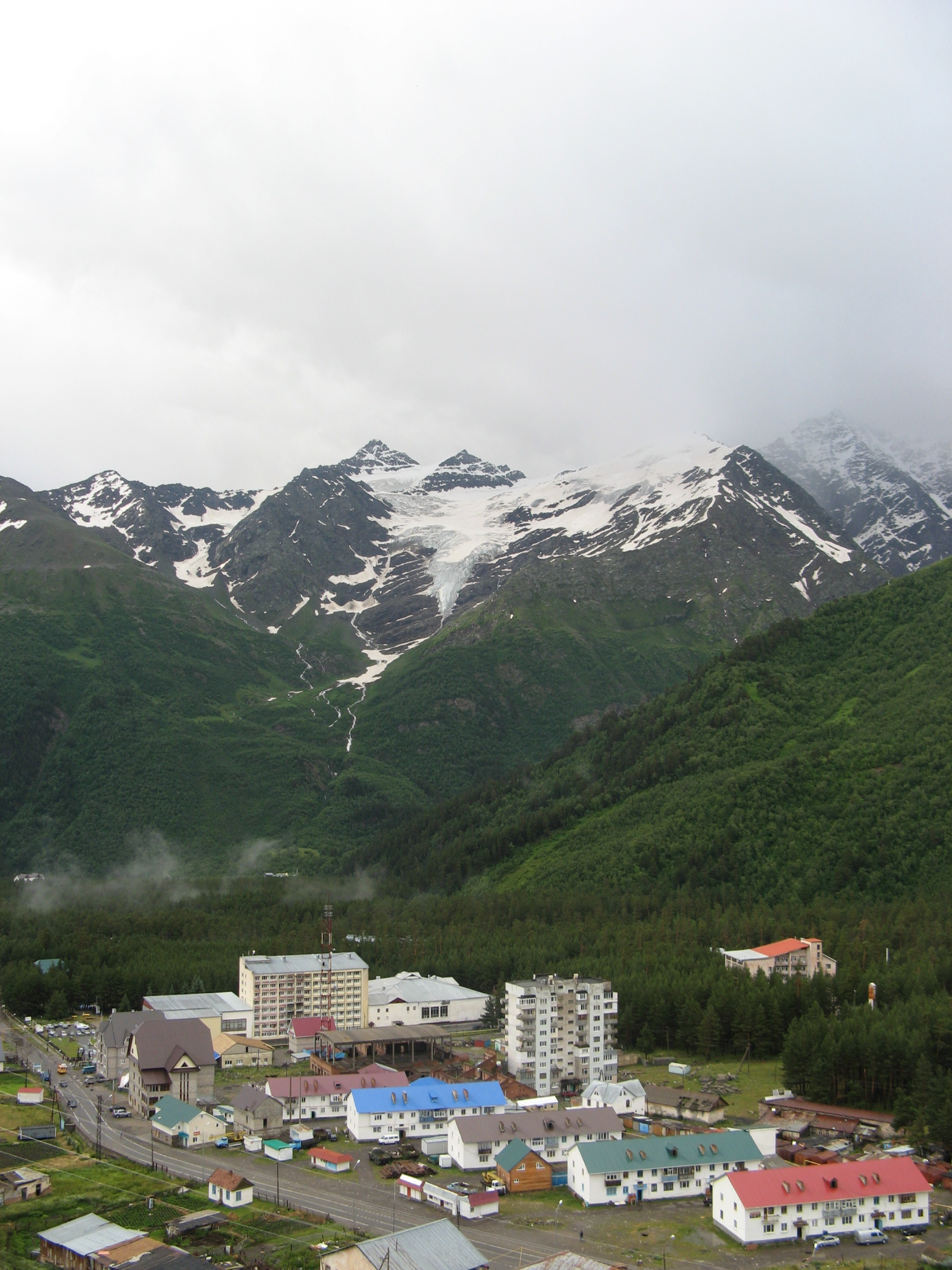 п.Терскол, вид с тропы, ведущей к водопаду "Девичьи Косы",Приэльбрусье, июль 2008